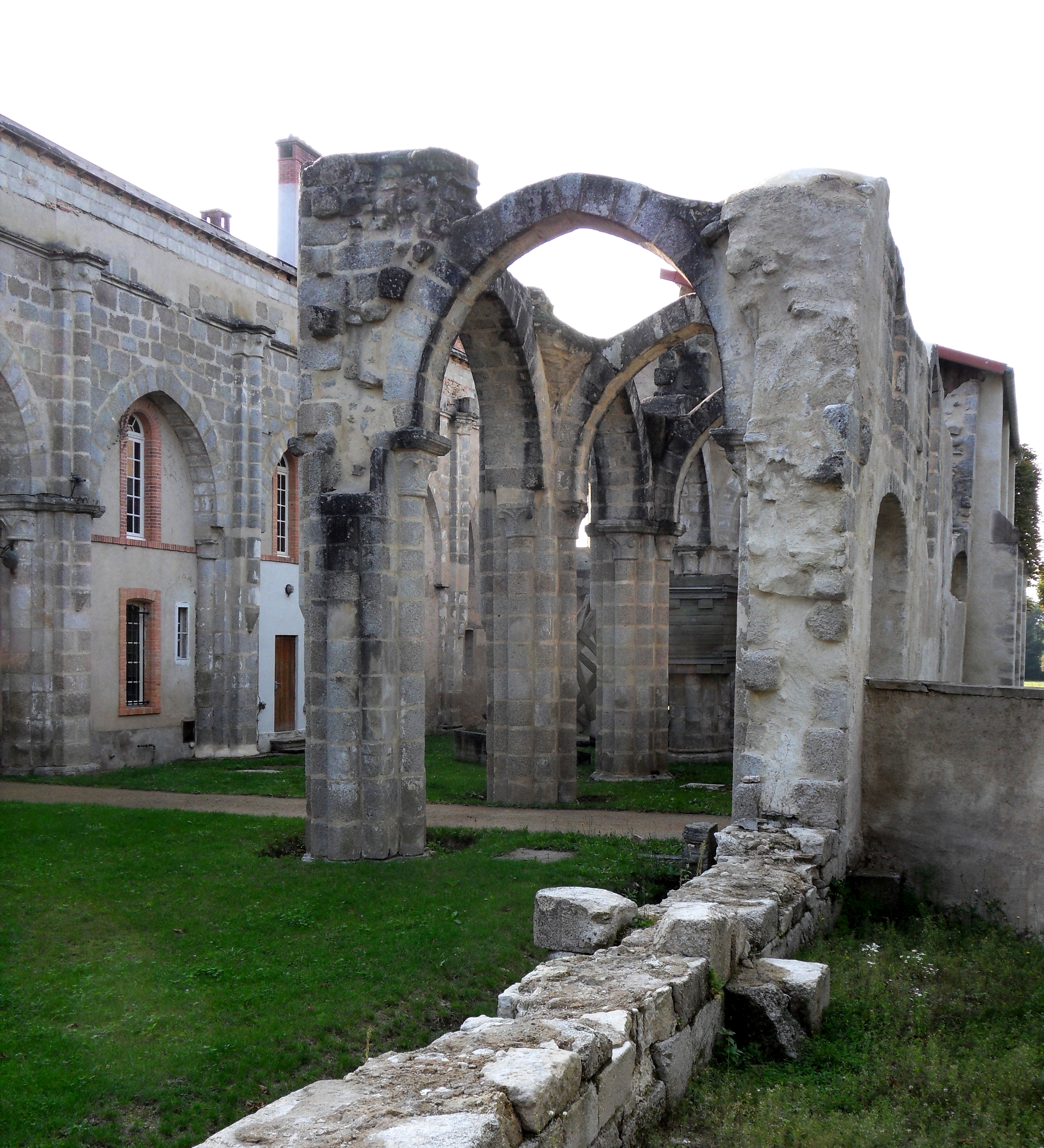 Abbaye de Montpeyroux, (Inscrit, 2000) .